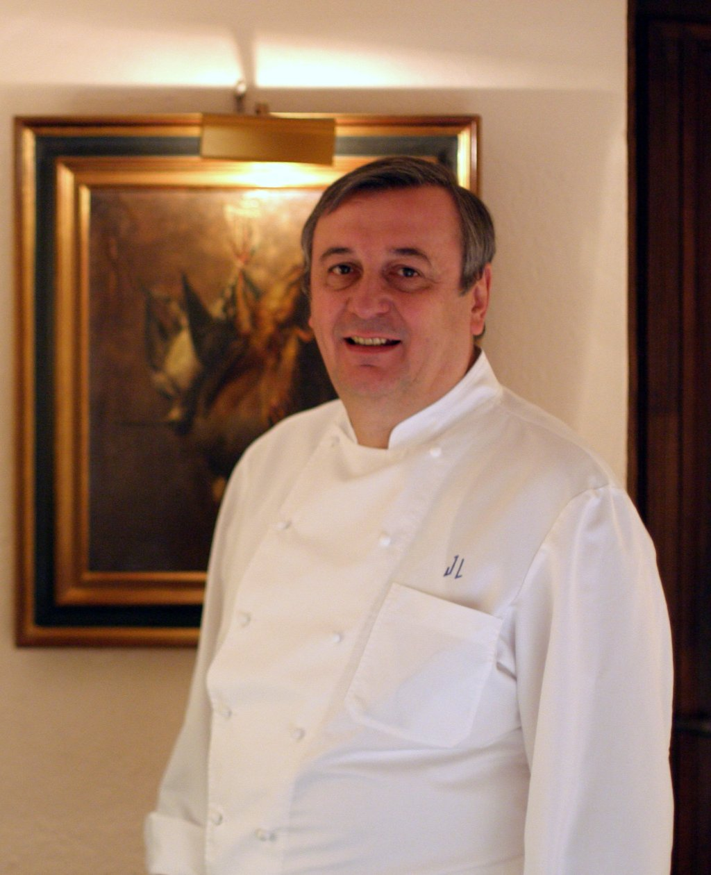 Jacques Lameloise